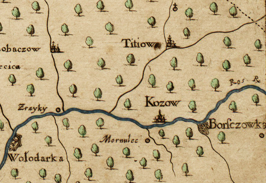 Містечка і села Тетіїв, Володарка, Кошів, Мармуліївка, Борщагівка, річка Рось (фрагмент мапи Боплана)